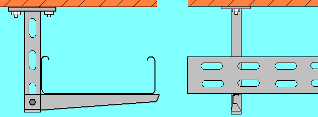 Kabelbahn